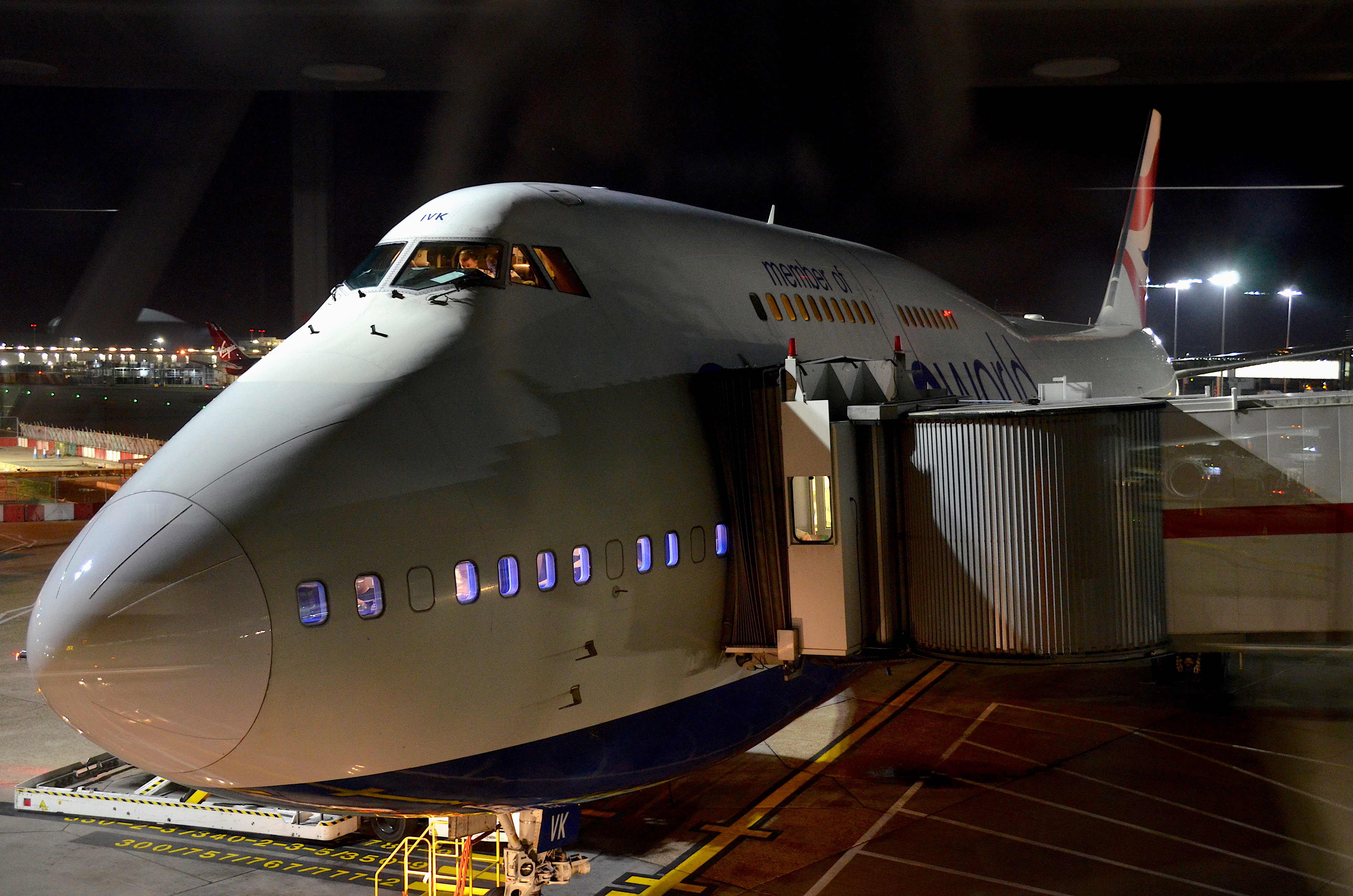 Boeing 747-400 (British Airways)